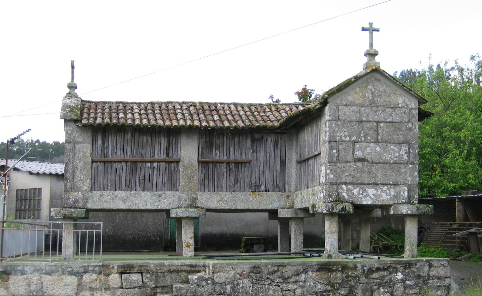 Hórreo de Simes (Meaño).